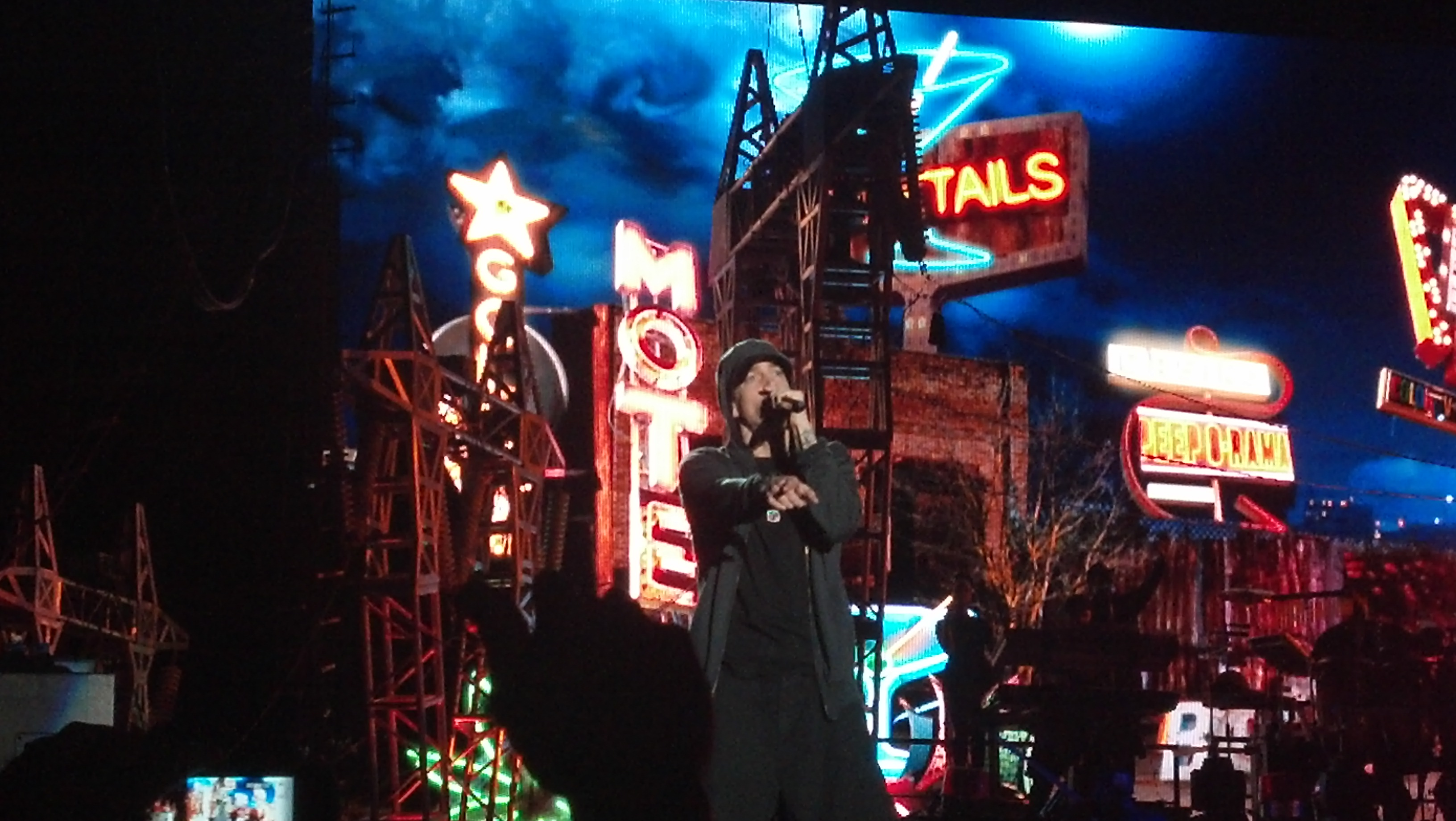 Eminem